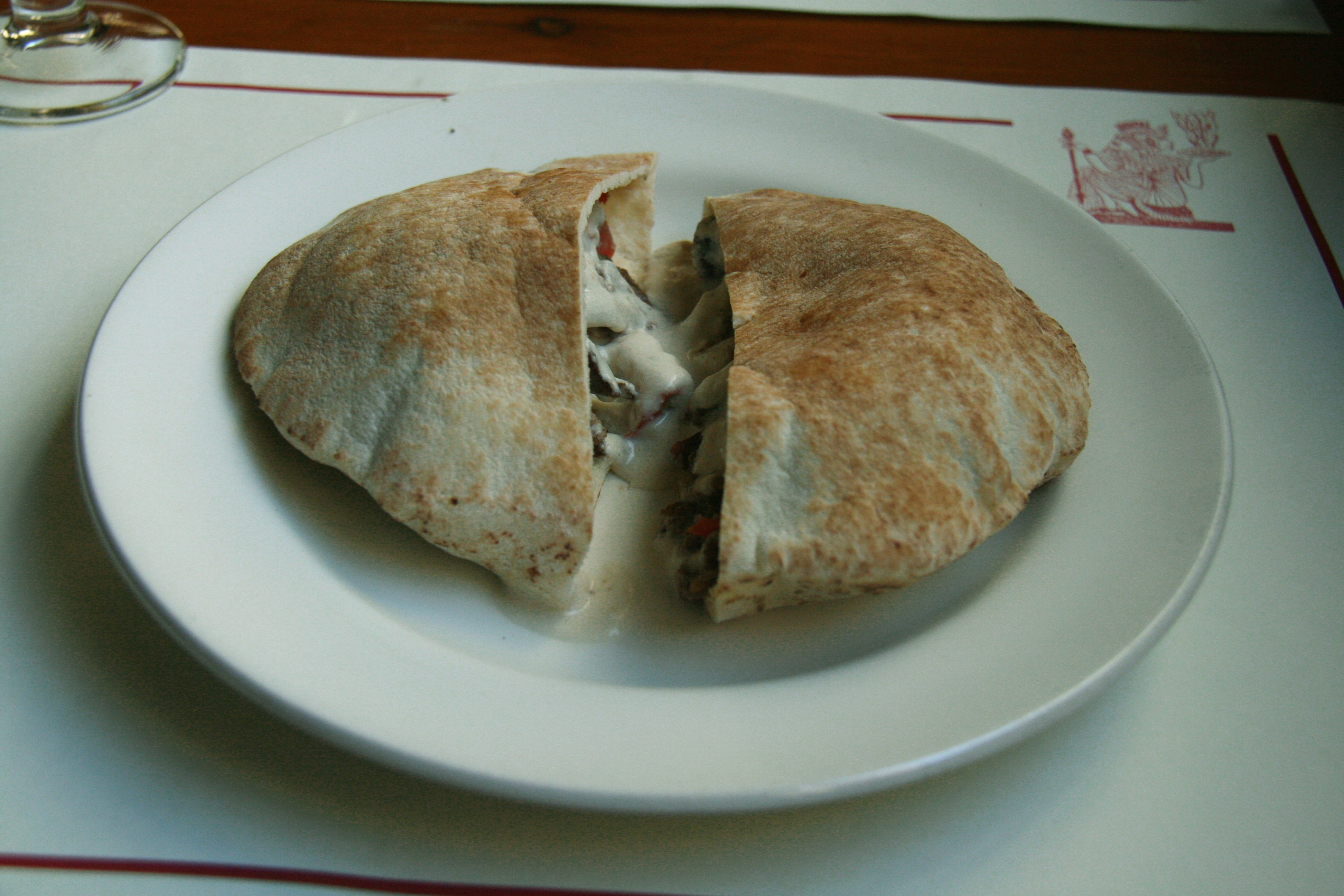 Bolsillo de carne de cordero con yogurt